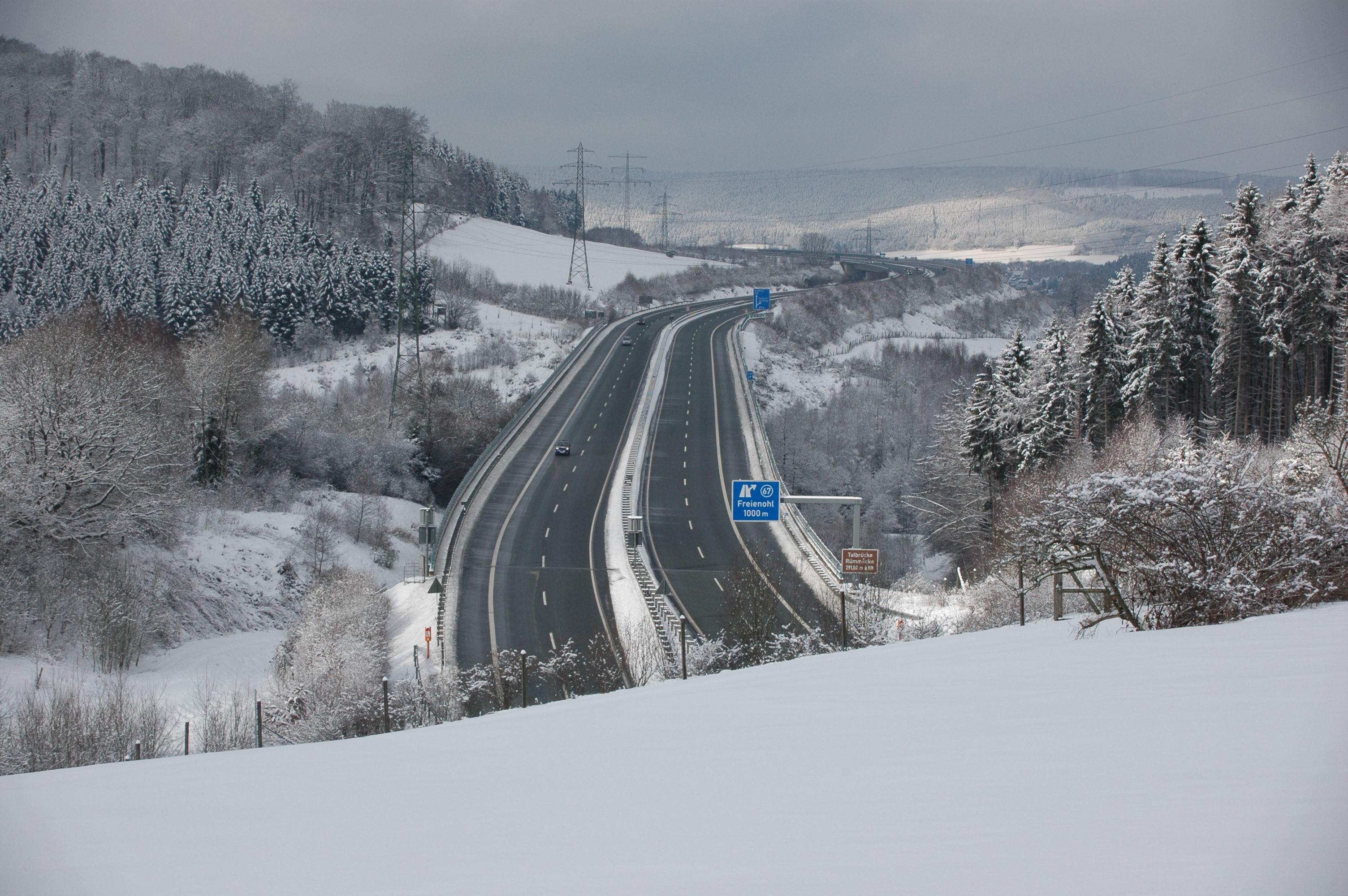 Winterlandschaft mit Bundesautobahn 46 bei der Anschlussstelle Freienohl, Meschede, Hochsauerlandkreis, Nordrhein-Westfalen